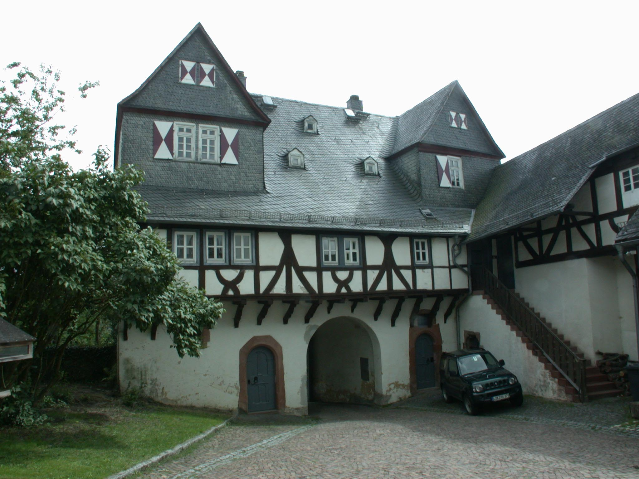 Torhaus von Schloss Neuweilnau, Weilrod, Hintertaunus, Hessen, Deutschland. Das Schloss war u.a. Geburtsort von Philipp III. (Nassau-Weilburg) (1504-1559), dem Erbauer der Residenz Weilburg. Es wurde von einem seiner Söhne, Philipp IV. (Nassau-Weilburg) (1542-1602), von 1564-1566 als Residenz ausgebaut, bevor dieser 1571 seine Residenz von Neuweilnau nach Saarbrücken wegen eines Erbfalls verlegte.